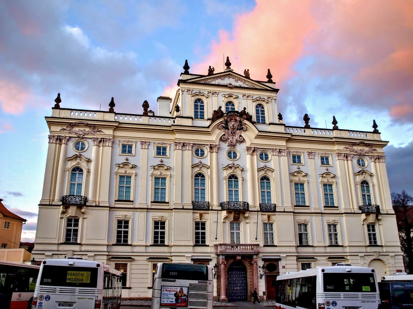 Hradčanské náměstí